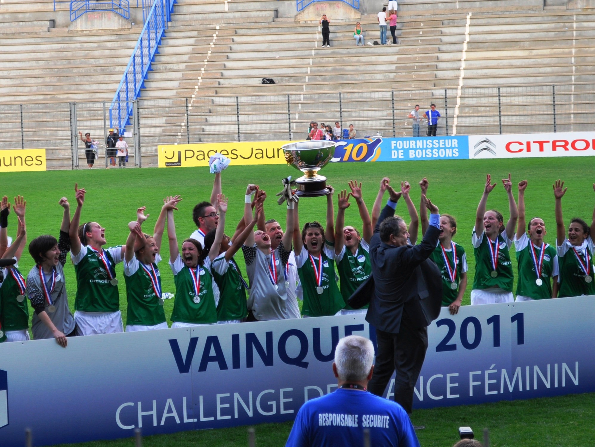 L’AS Saint Etienne vainqueur du Challenge de France en 2011. Finale le 21 mai 2011, complexe sportif de la Pépinière à Buxerolles (86), 2200 spectateurs environ AS Saint-Etienne - Montpellier HSC : 0-0, 3 t.a.b à 2 (0-0) Coupe remise par Fernand Duchaussoy, président de la fédération française de football.